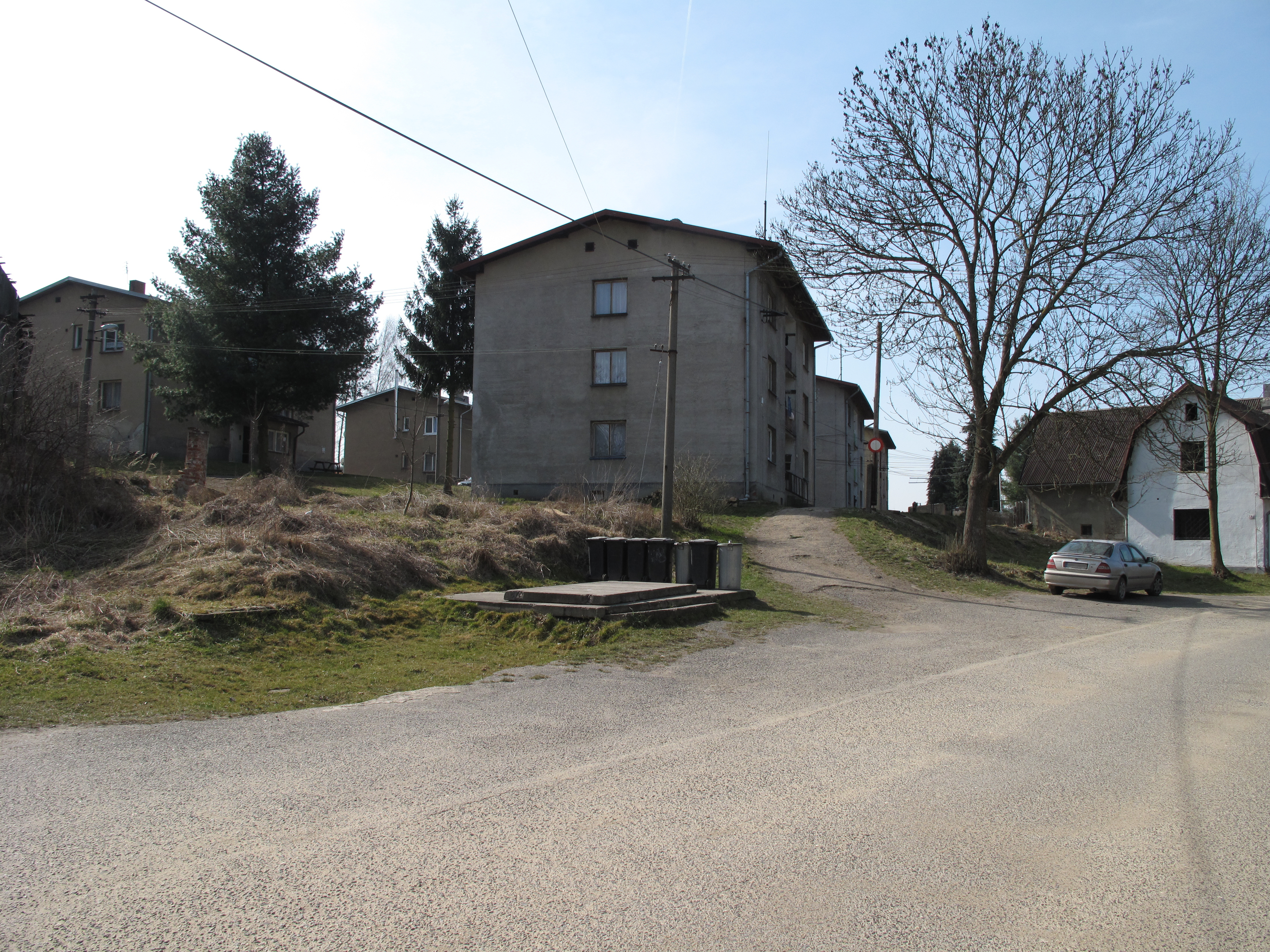 Bytovky v Náhlově. Okres Česká Lípa, Česká republika.